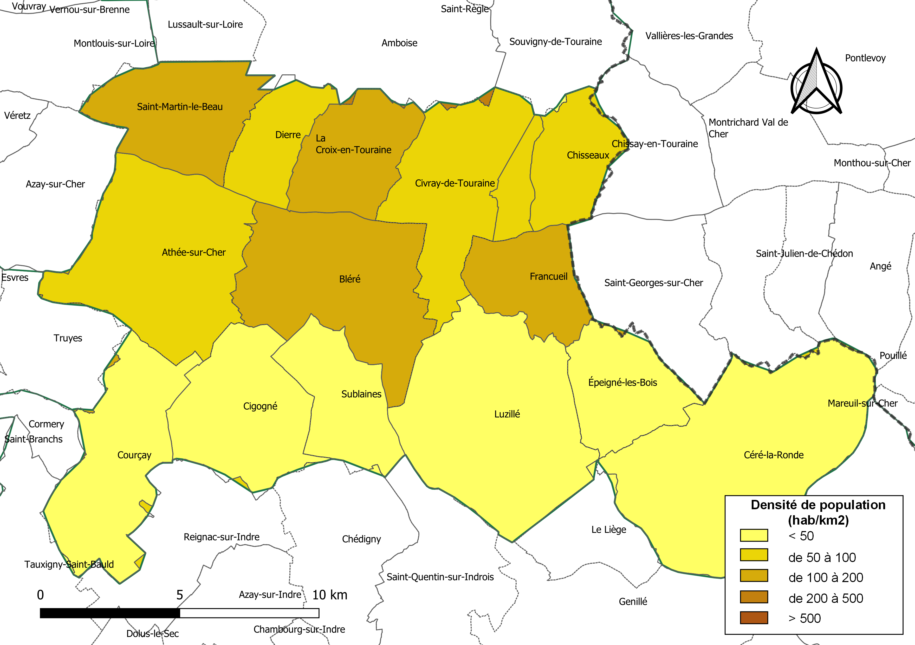 Carte des densités de population (millésimée 2016) des communes de la communauté de communes la Communauté de communes de Bléré Val de Cher, département d'Indre-et-Loire, France. Composition au 1er janvier 2019.